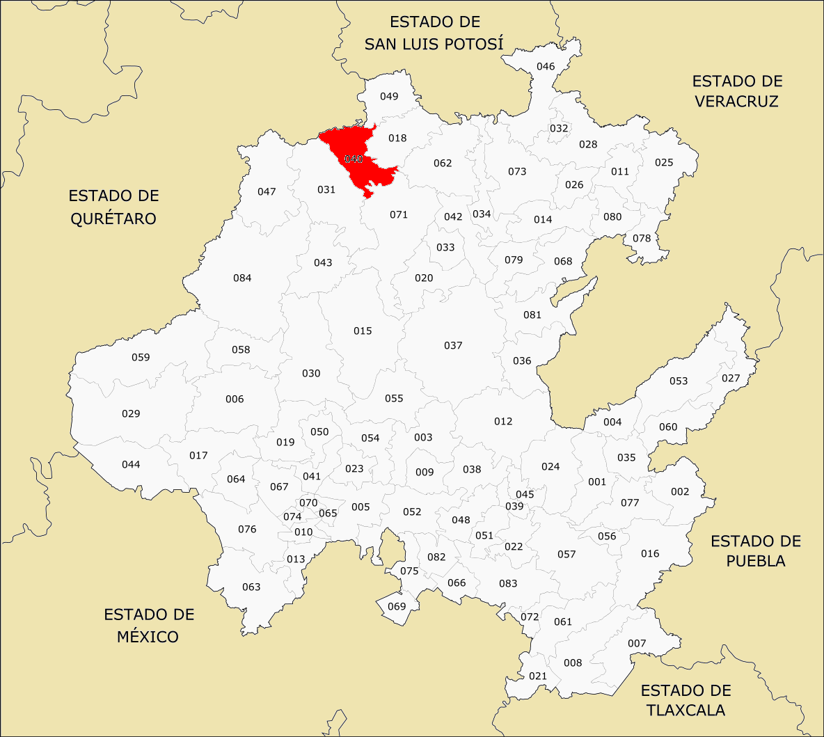 Municipios de Hidalgo